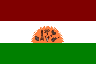 Bandera de Maní Dpto del Casanare